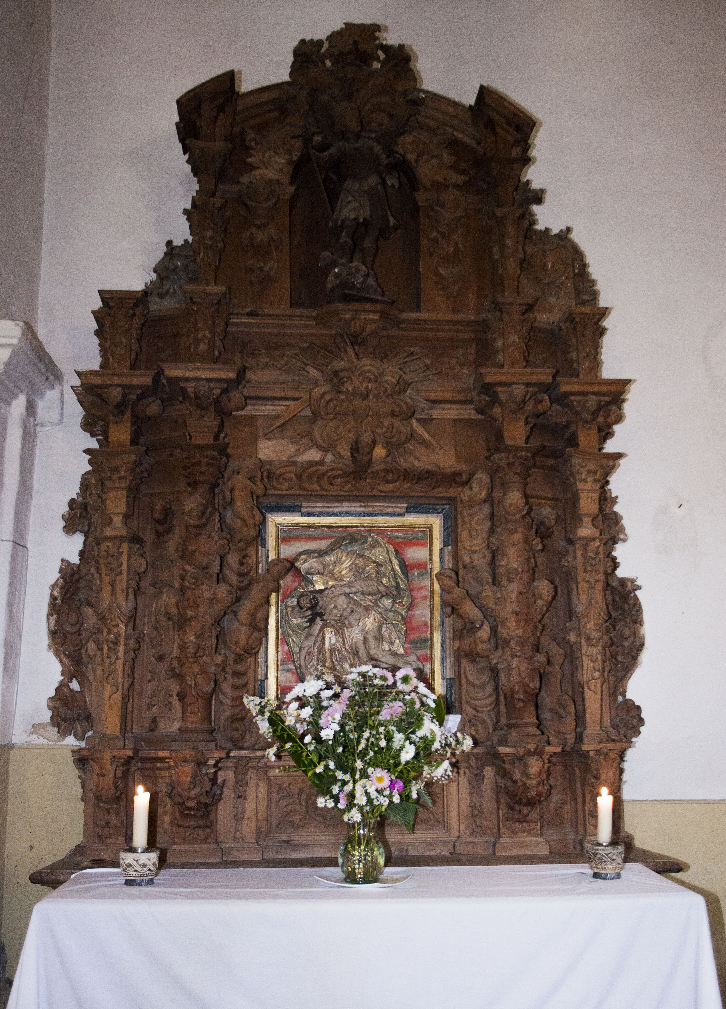 Retablo de la Piedad de la iglesia parroquial de Albares de la Ribera